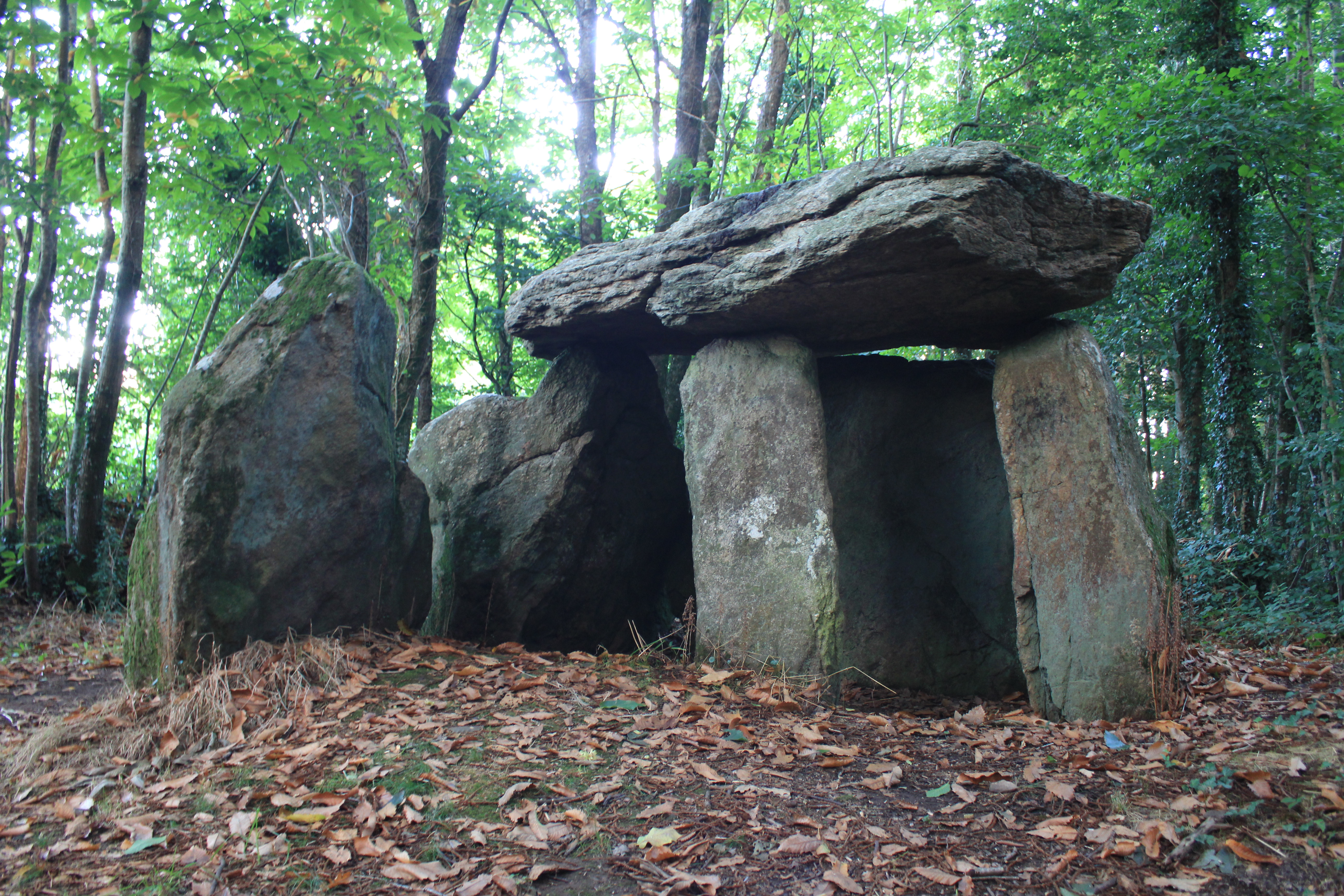 Dolmen de Tri-Men-de-Castello. Vue du sud vers le nord. .